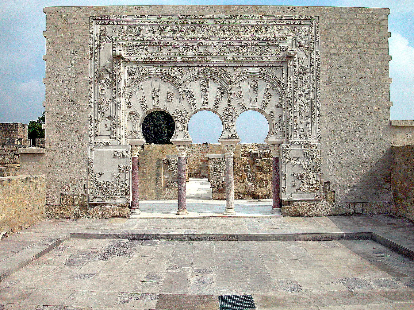 Vivieda de Yafar